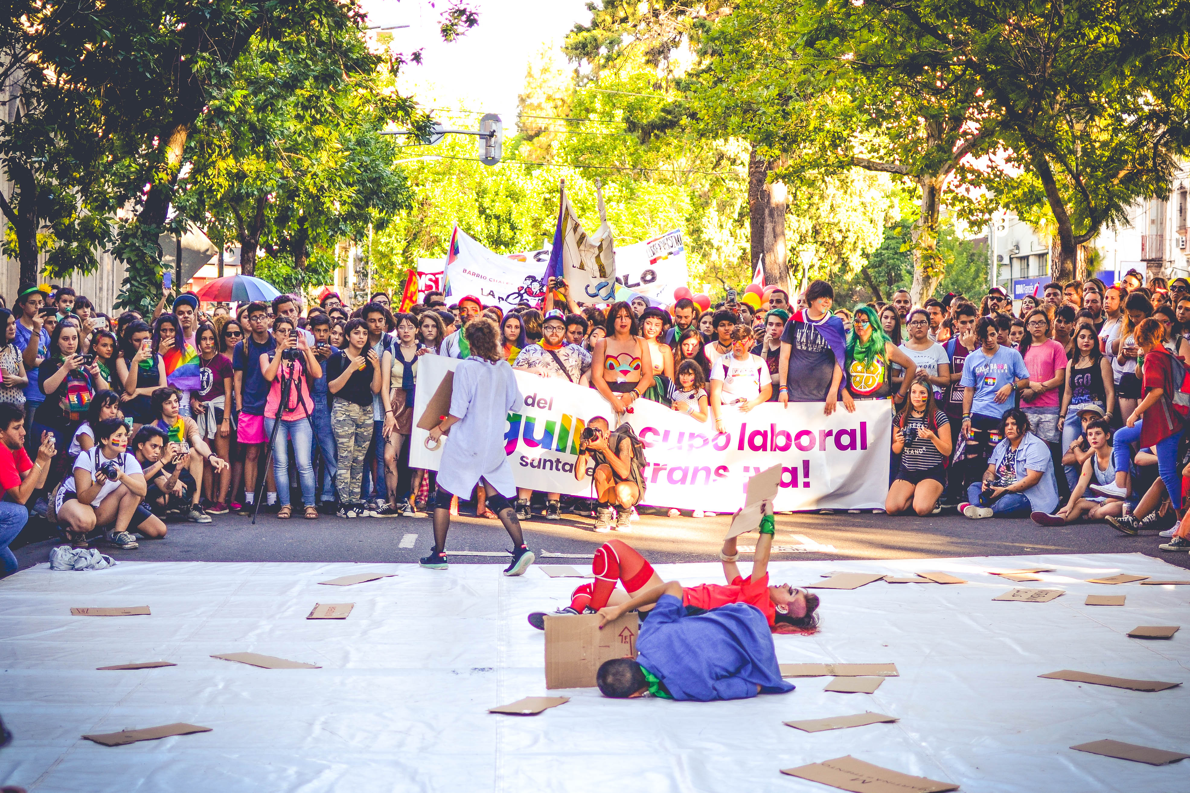 Marcha del Orgullo Santa Fe, Argentina 2017